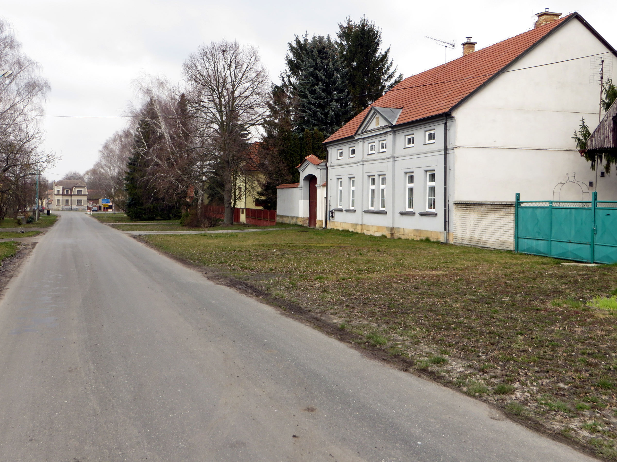 Dobšice. GPS: 50.1327292N, 15.2687814E